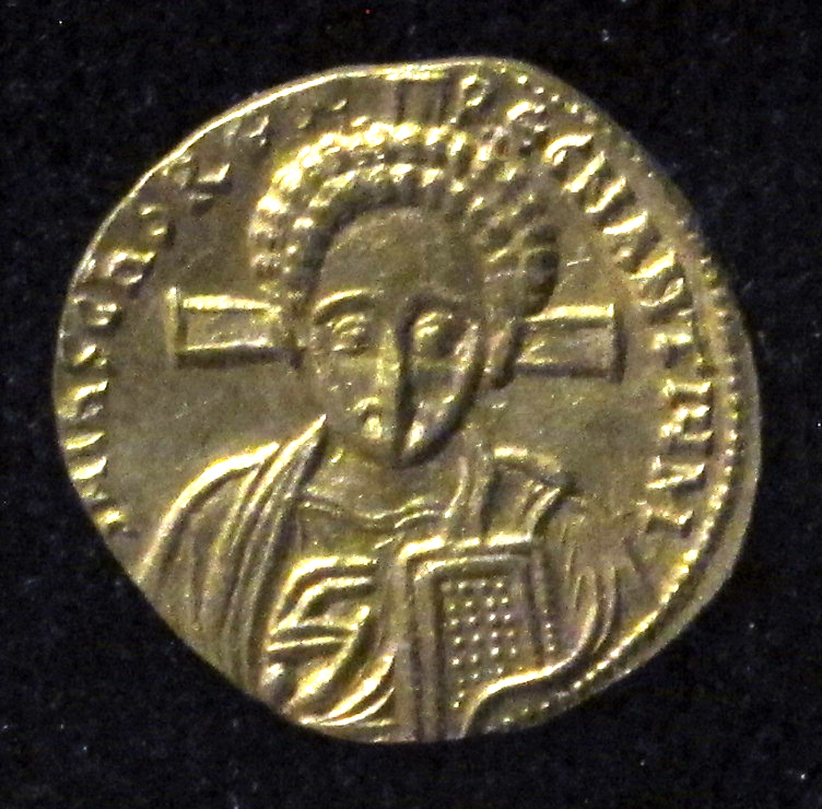 Monete d'oro di giustiniano II e tiberio IV, 705-711, 06, 2